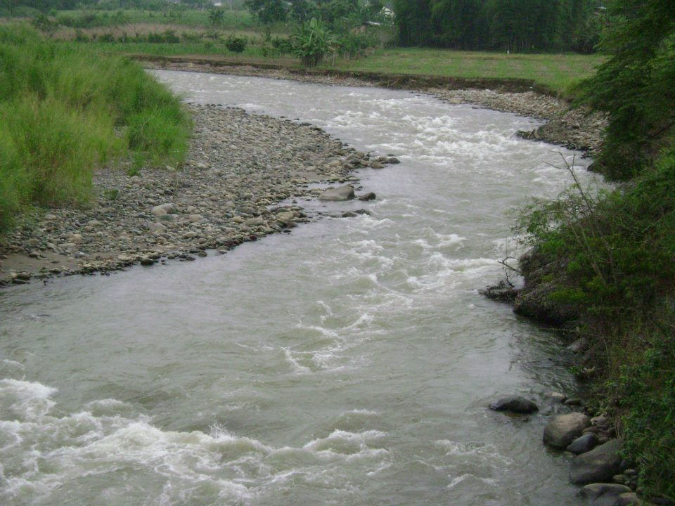 Río Sibimbe